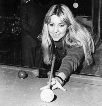 Diana S. Gallardo, Tri-Campeona Argentina de bola 8 (1986/87/88), en ParkLane Recoleta